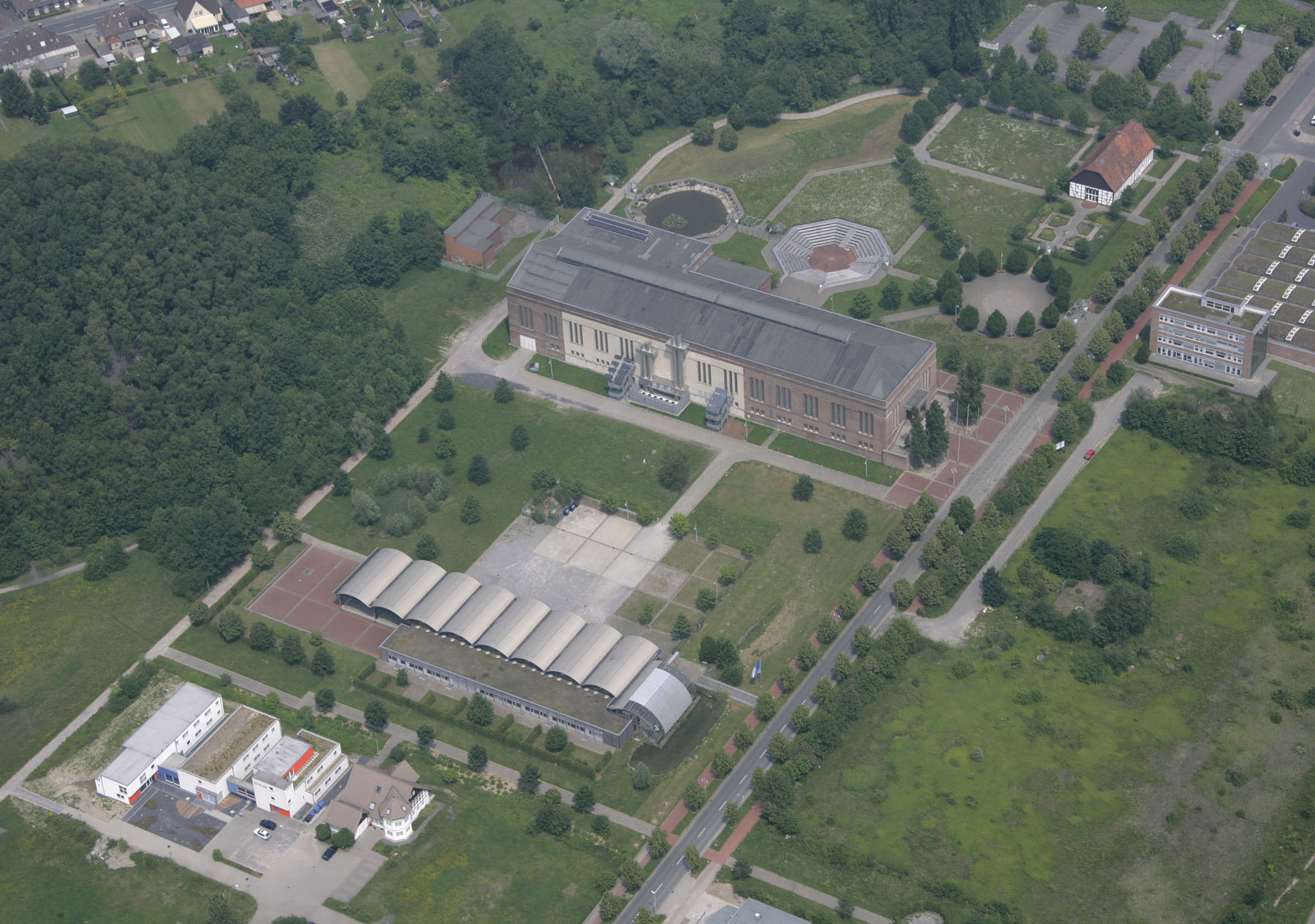 Luftbildaufnahme Hamm